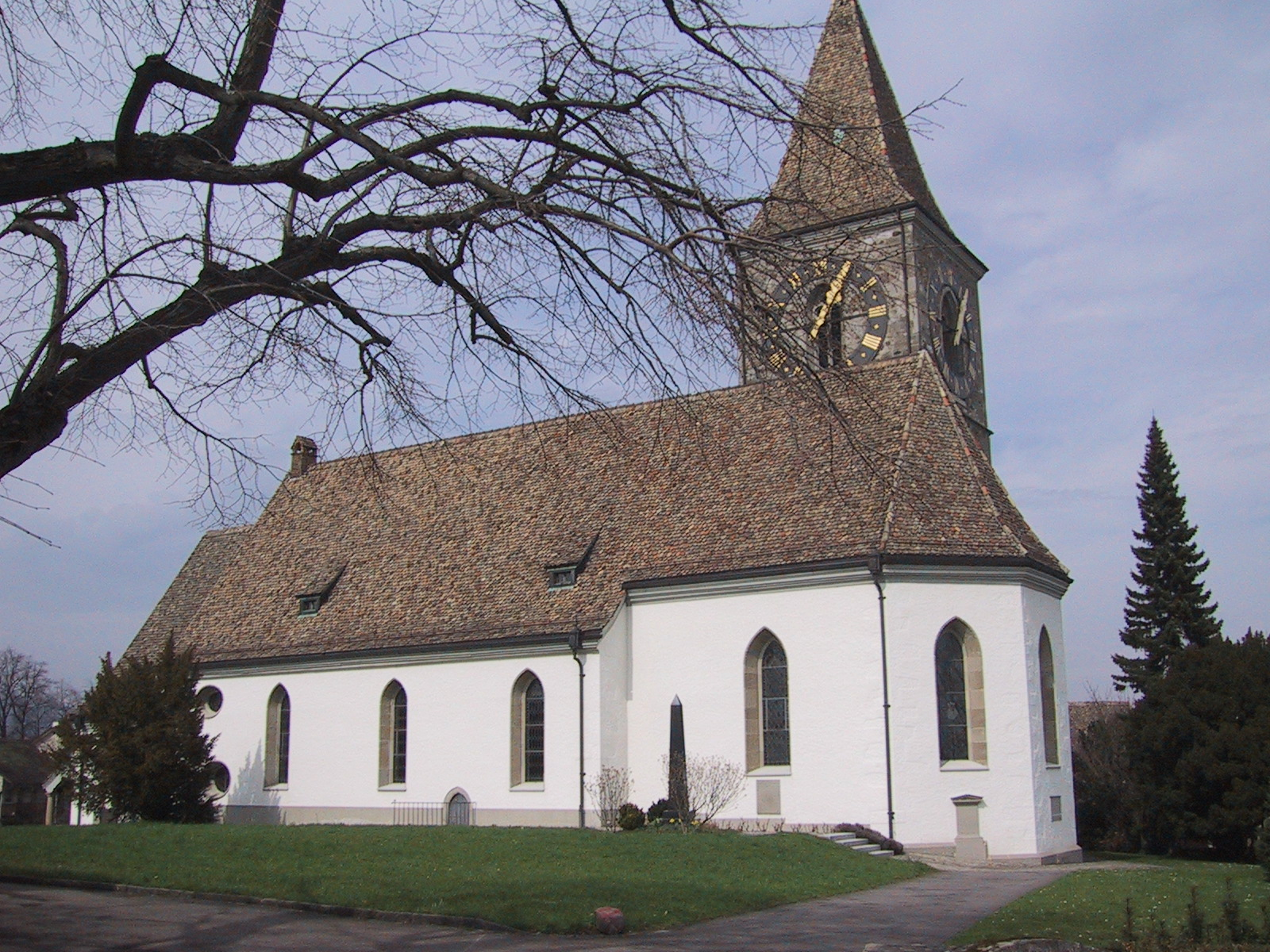 Aufnahme der Kirche von Kilchberg bei Zürich, davor das Grabmal von Conrad Ferdinand Meyer